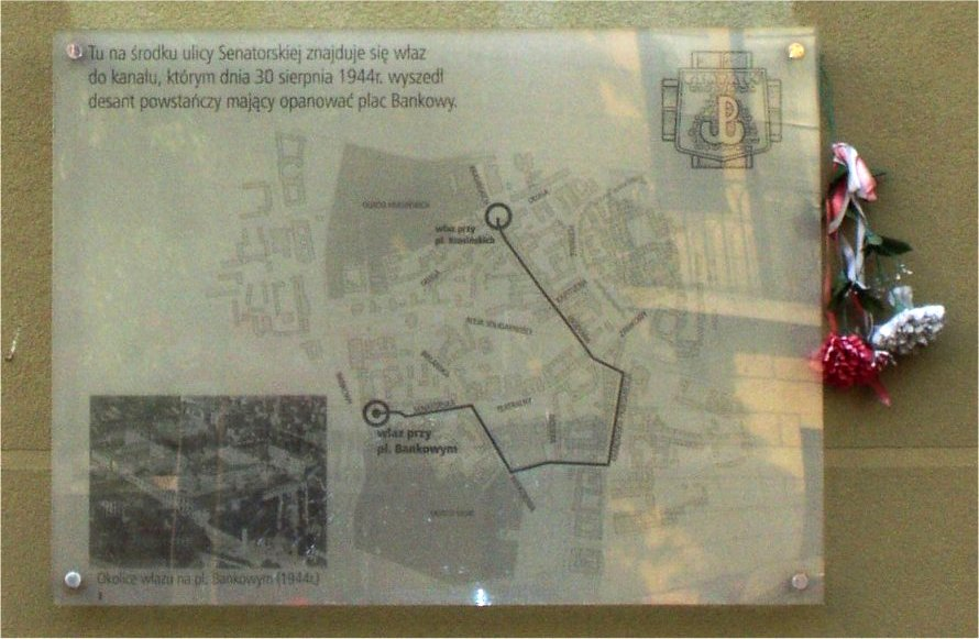 ul. Senatorska od strony placu Bankowego w Warszawie (fot Wikipedysta Zu)